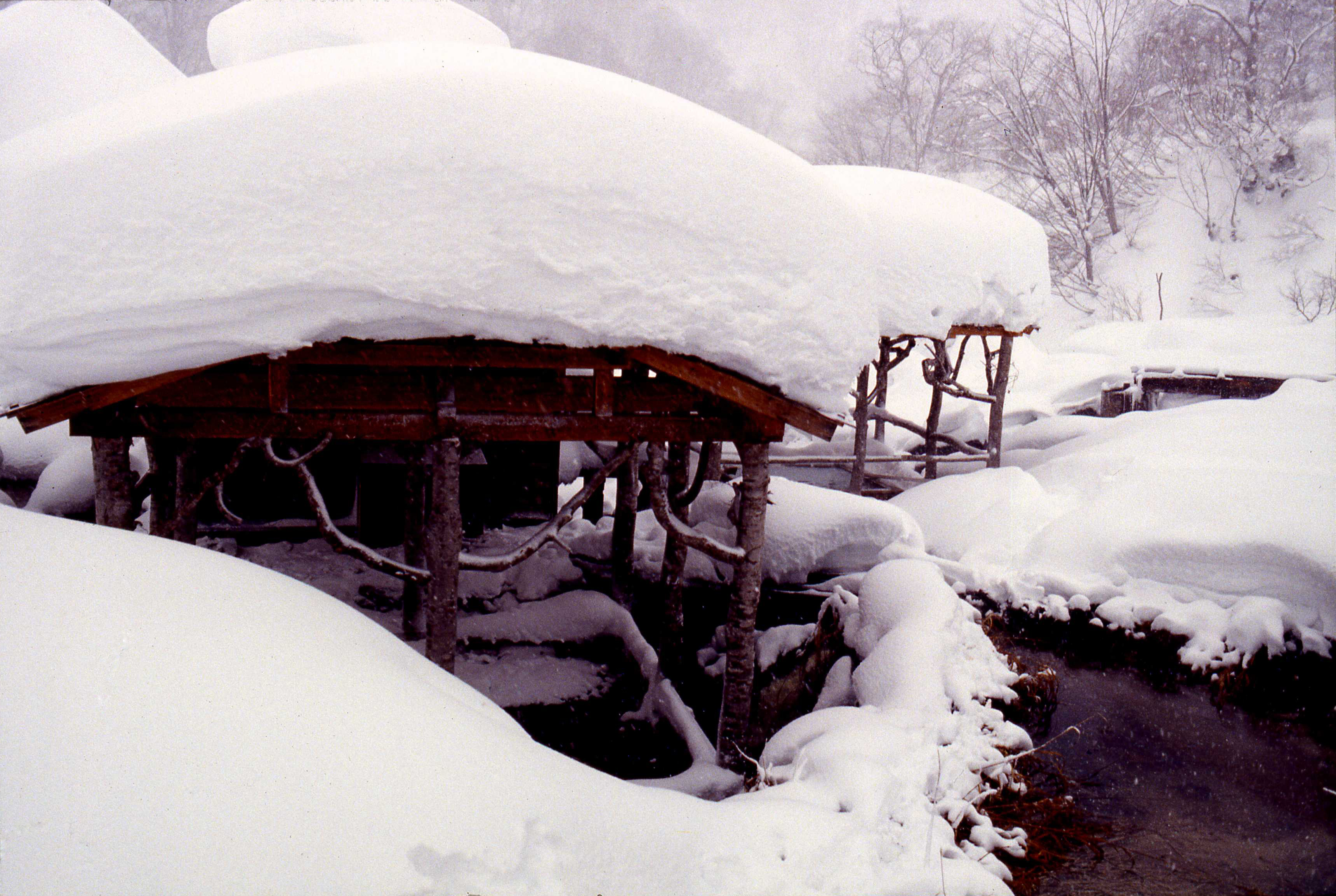 雪の黒湯温泉